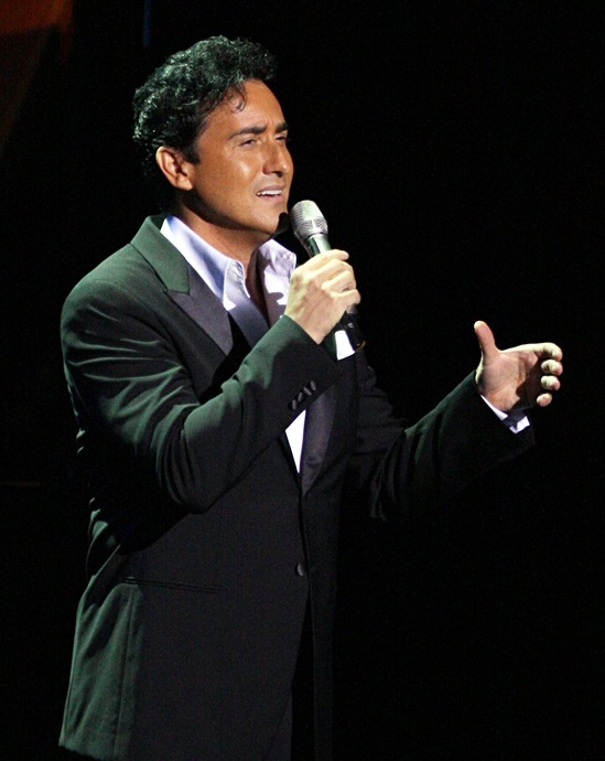 Carlos Marin - Il Divo Orchestra in Concert At Sydney Opera House